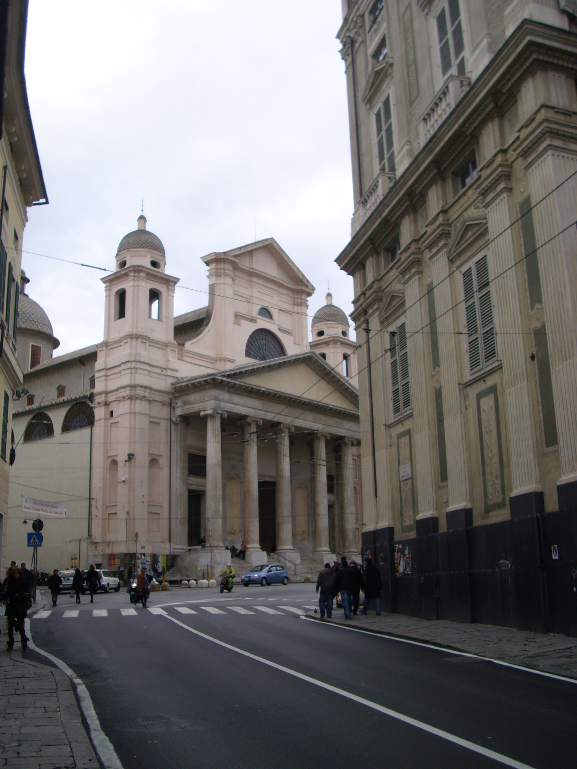 Chiesa di Santissima Annunziata del Vastato, in piazza della Nunziata, vista da via delle Fontane, Genova